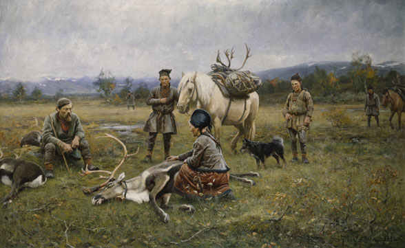 Lappar tillvaratagande skjutna renartitle QS:P1476,sv:"Lappar tillvaratagande skjutna renar" label QS:Lsv,"Lappar tillvaratagande skjutna renar" label QS:Lru,"Отстрел оленей"